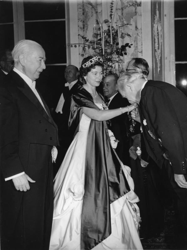 Besuch des Griechischen Königspaar in der Bundesrepublik Deutschland, 16.-23.9.1956 Information added by Wikimedia users.